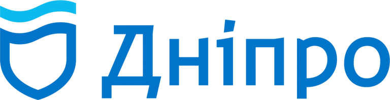 Оригінальний логотип міста Дніпро, прийнят у 2017 році згідно голосуванням за посиланням